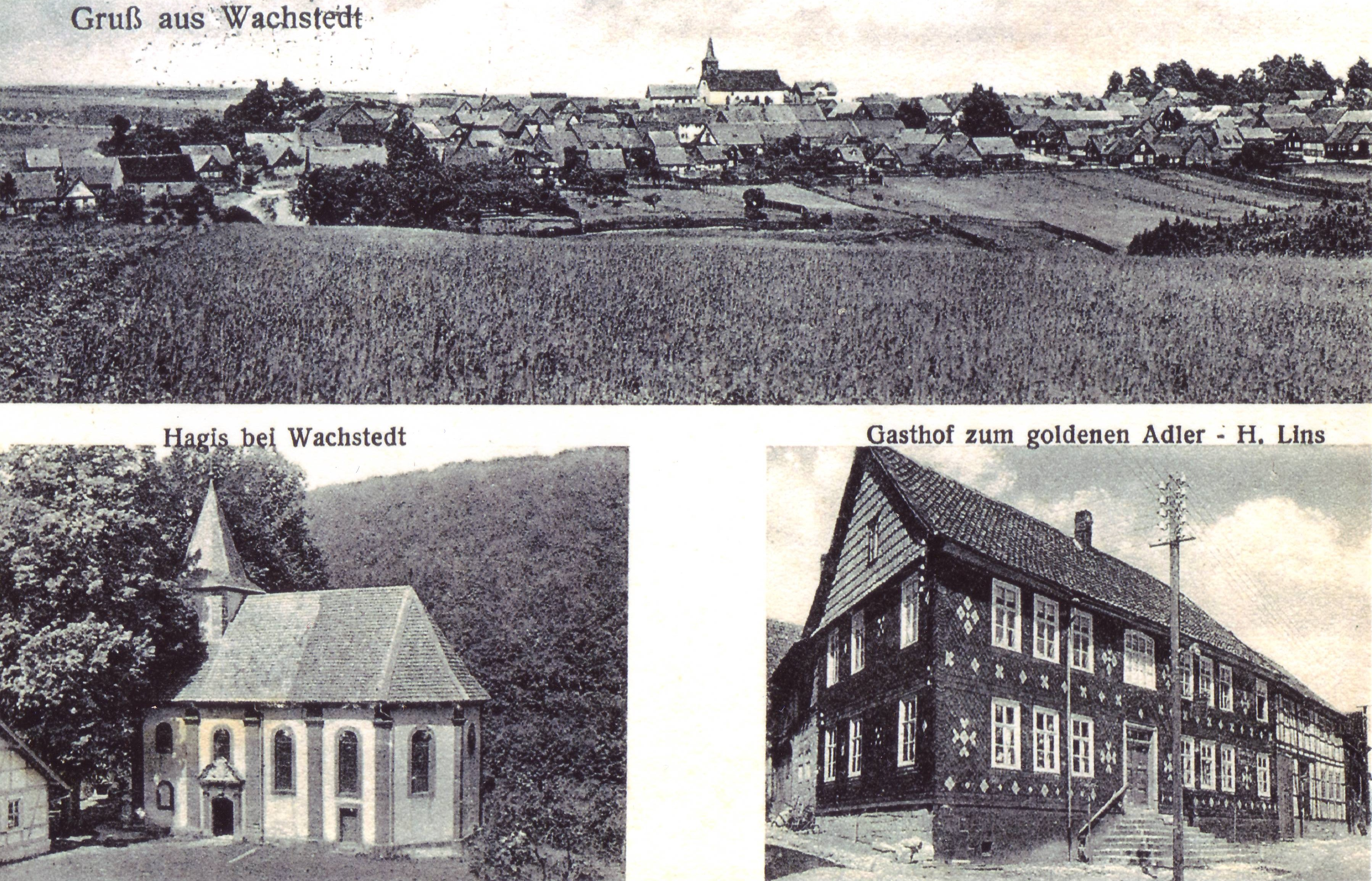 Ansichtskarte Goldener Adler